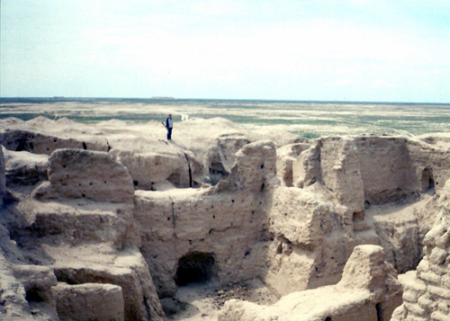 Комплекс городищ (развалины укреплений Джеты-Асар, 4 век после Р.Х.), 80 км к югу от Байконура